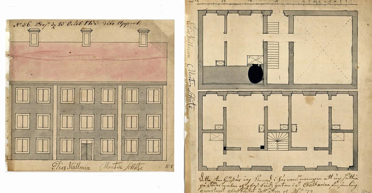 Elias Kullmans hus, ritning